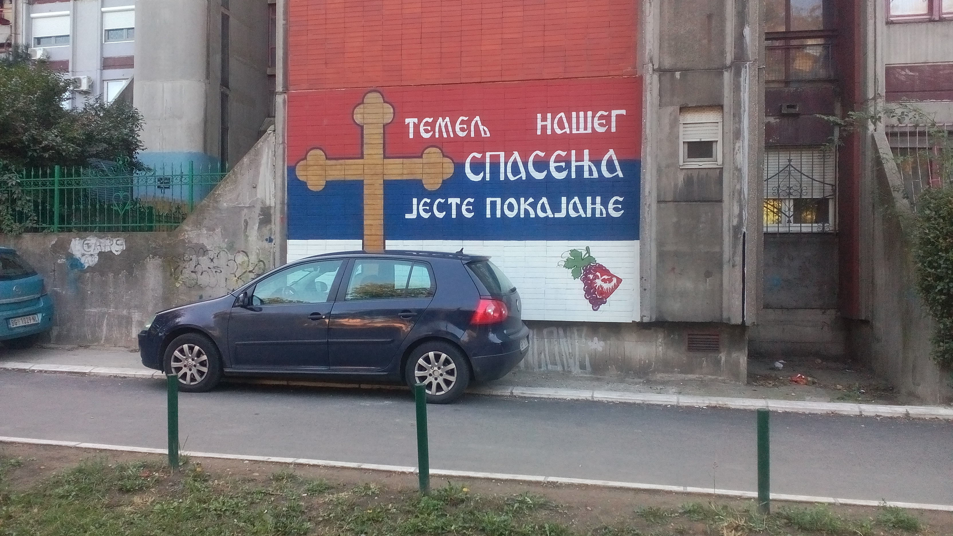 Улица Црнотравская, 1; Белград, Сербия.